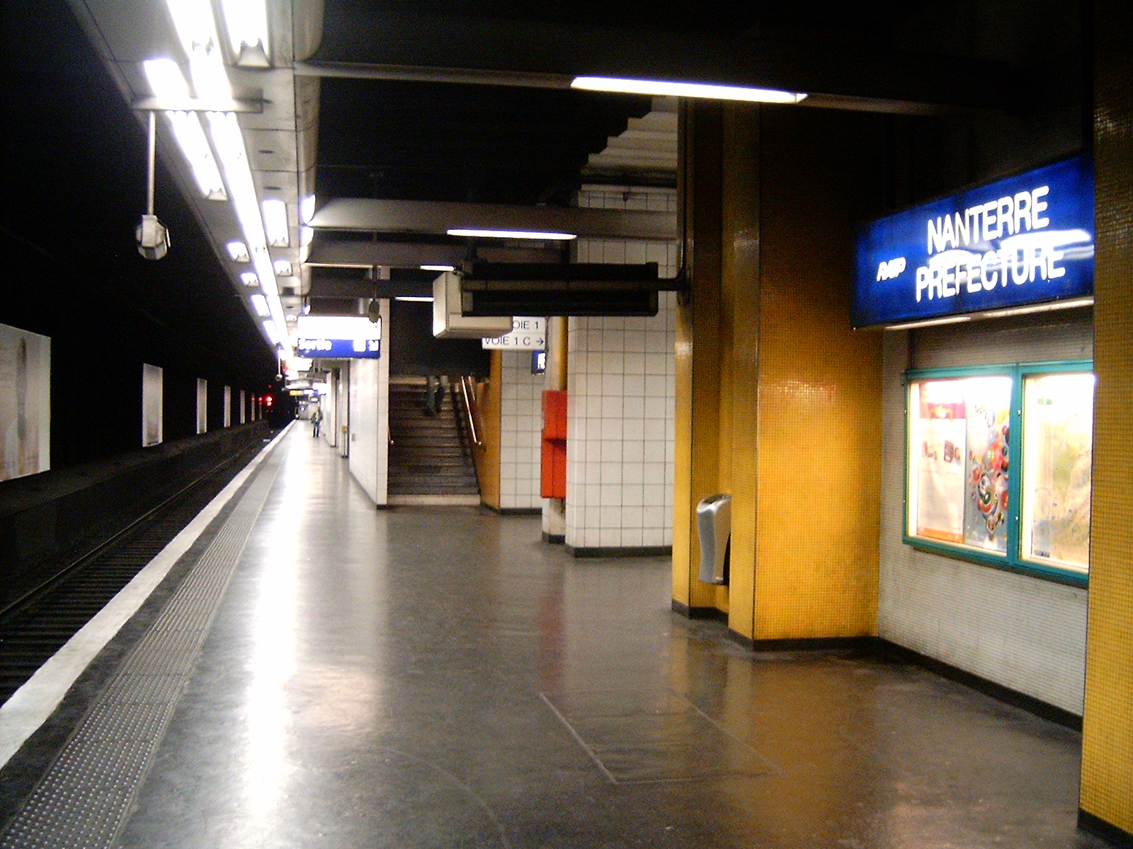 Gare de Nanterre-Préfecture : vue du quai direction Saint-Germain-en-Laye Boissy.